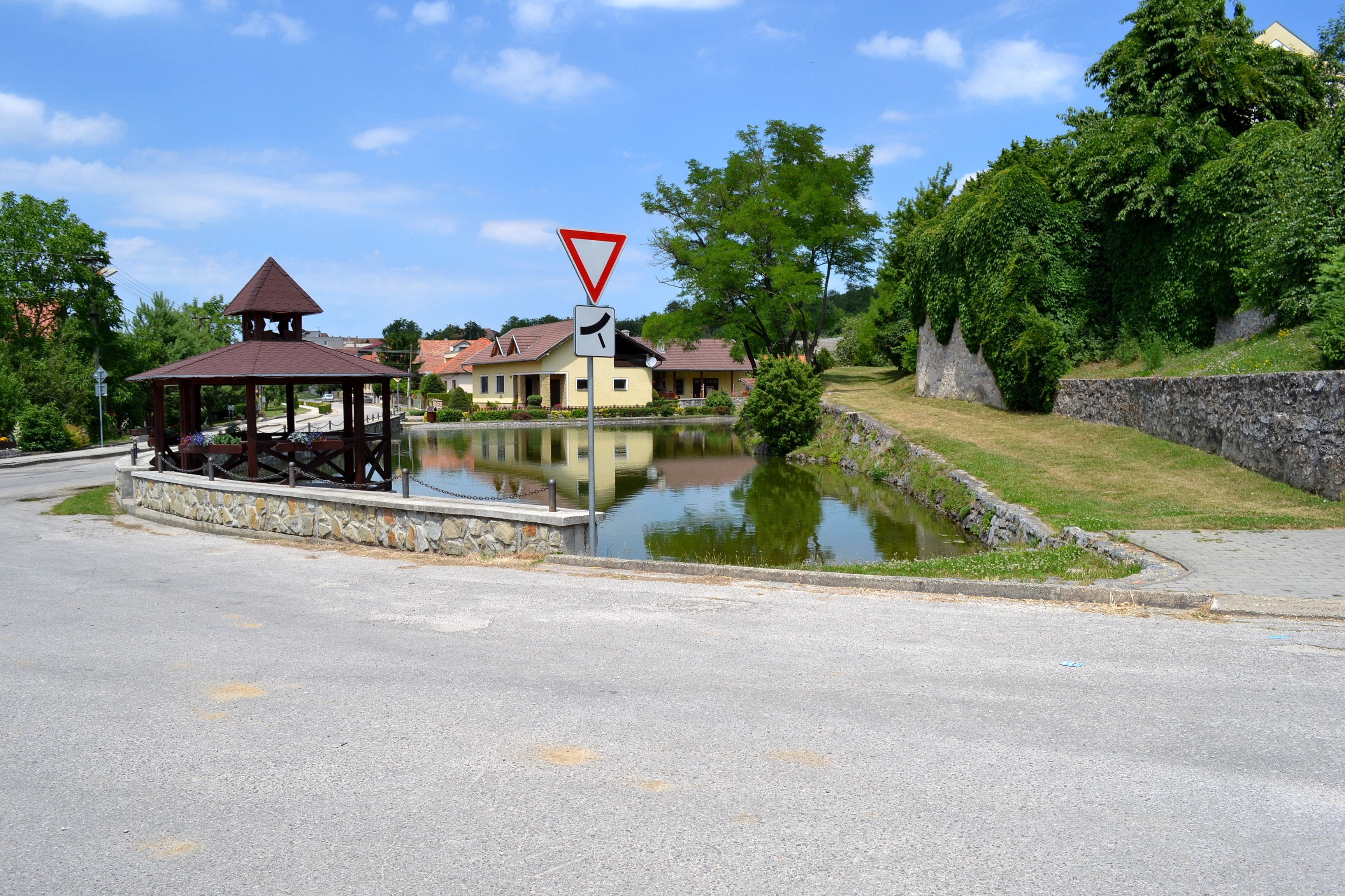 Veľký Klíž, pohľad na centrum obce